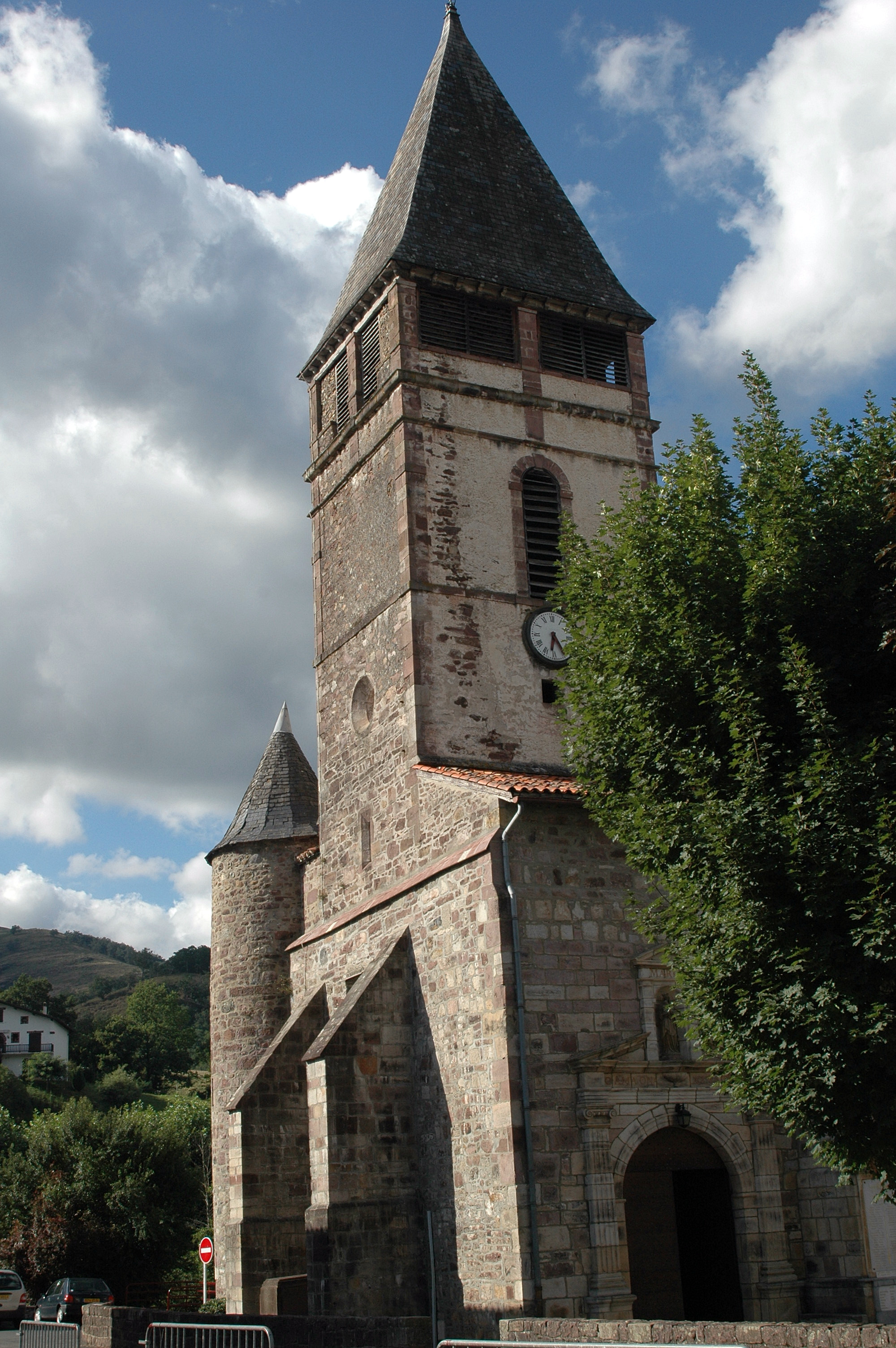 Saint-Étienne-de-Baïgorry, église Saint-Etienne. Photo prise le 03/08/06 par Harrieta171